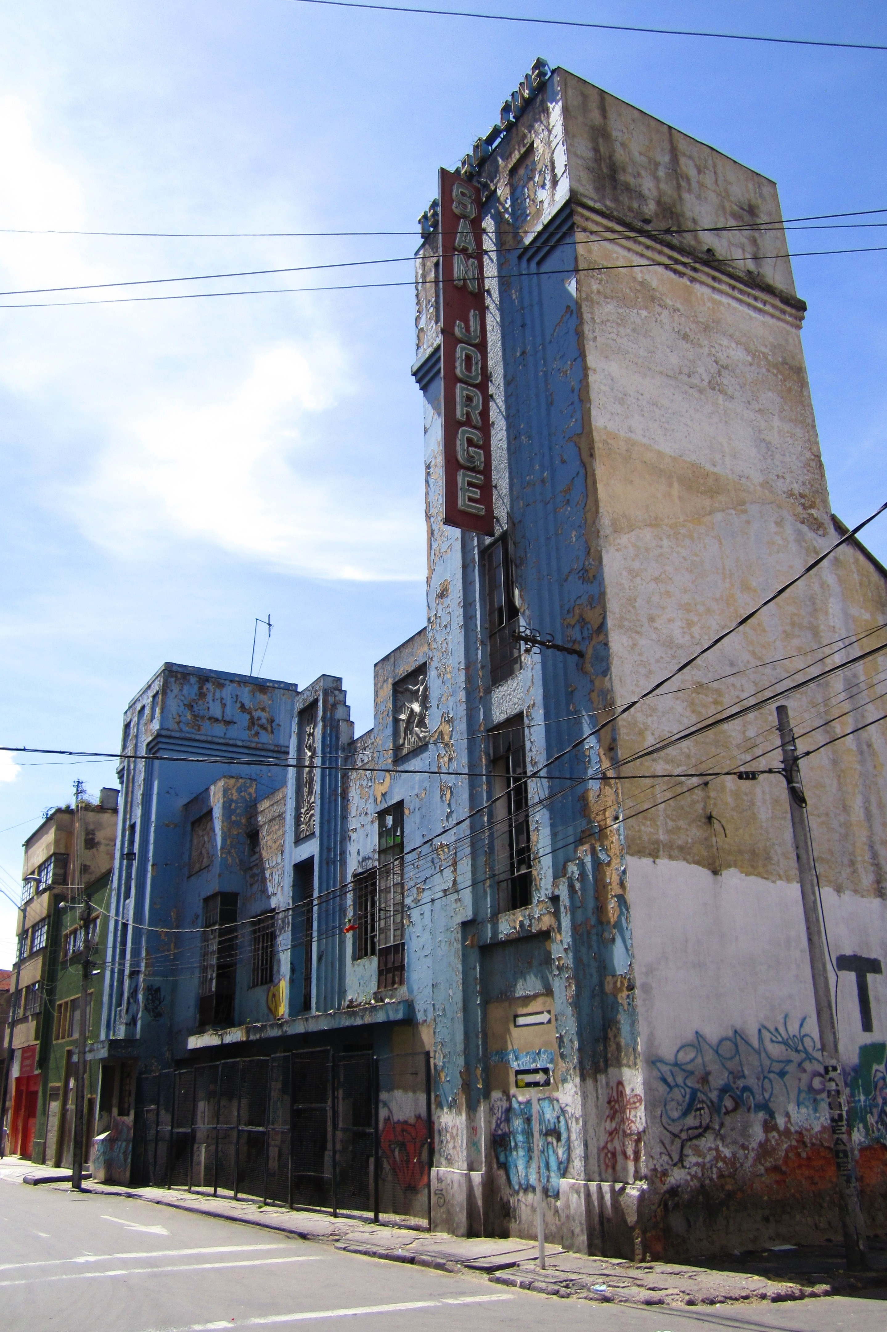 Bogotá Teatro San Jorge en el barrio San Victorino, localidad de Los Mártires.